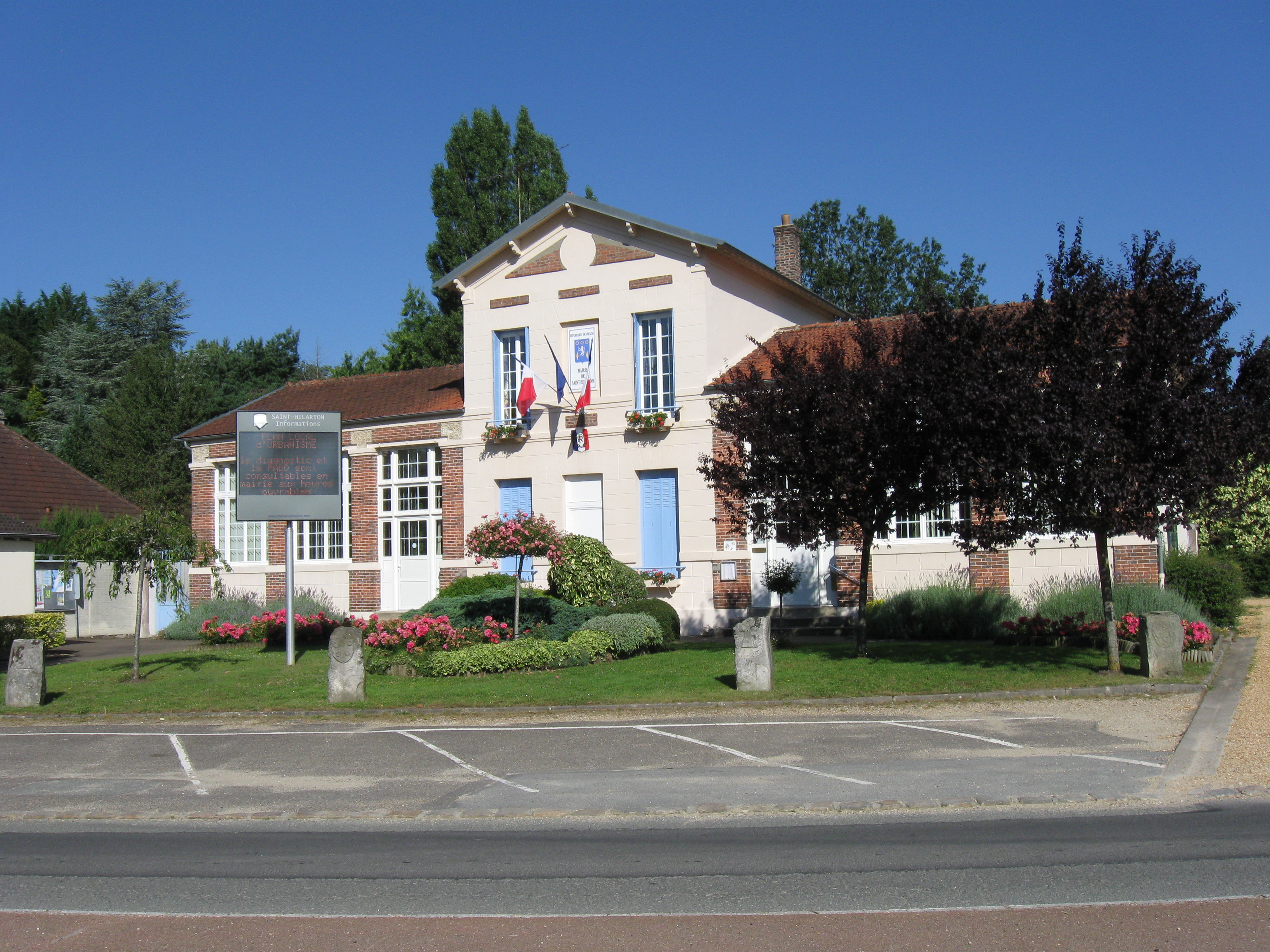 La mairie-école de Saint-Hilarion (département des Yvelines,, région Île-de-France)